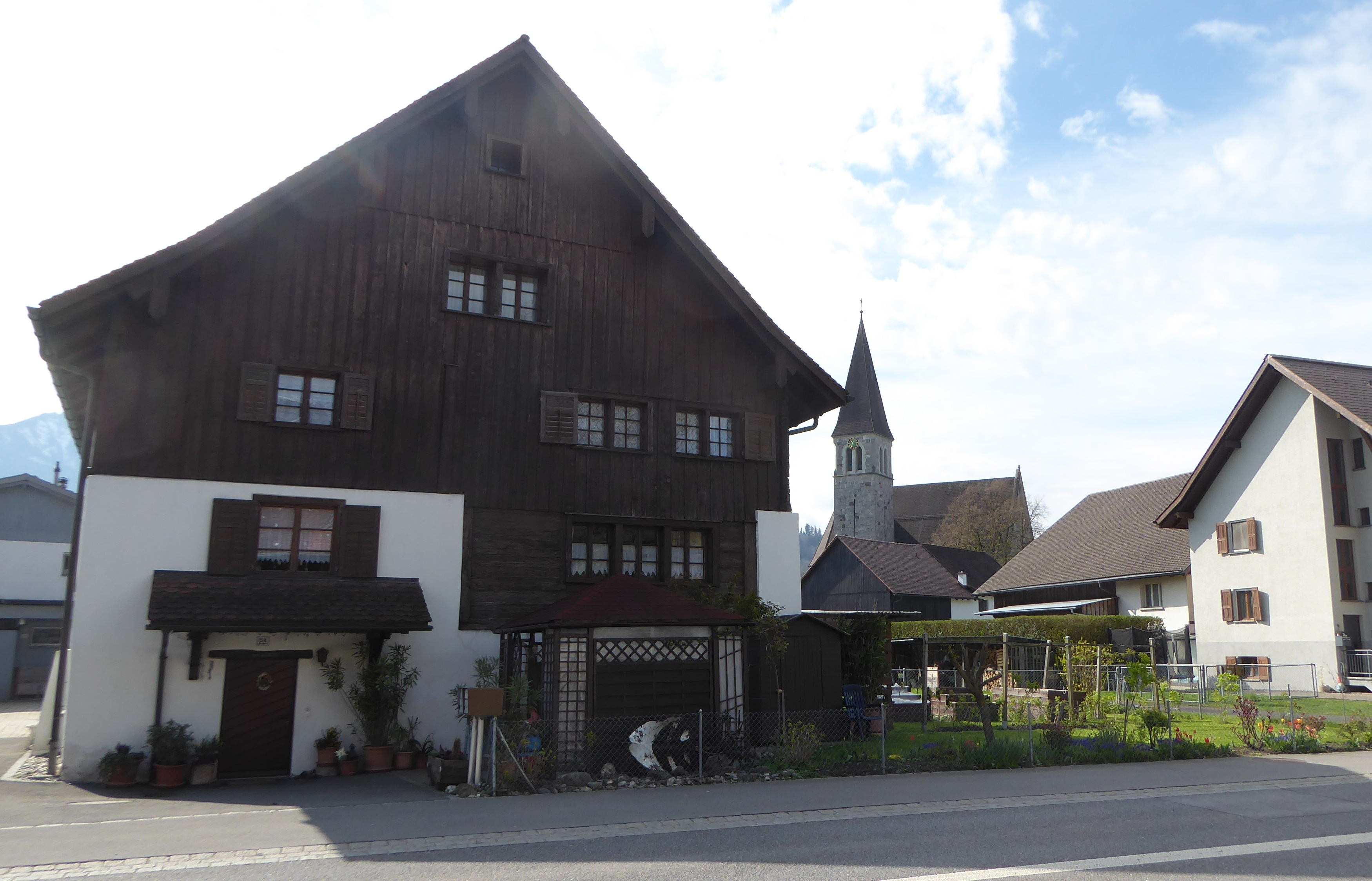 Ruggell, Haus Dorfstrasse 54 und hinten Pfarrkirche